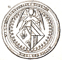 Siegel der Jeanne de Hochberg nach ihrer Heirat mit Louis I. von Orléans-Longueville (1504). Inschrift: "SCEL.DE.......DUCHESSE DE....UILLE.M.DE.ROTHELIN. (Scel de Jeanne, Duchesse d'Orléans et de Longueville, Marquise de Rothelin)